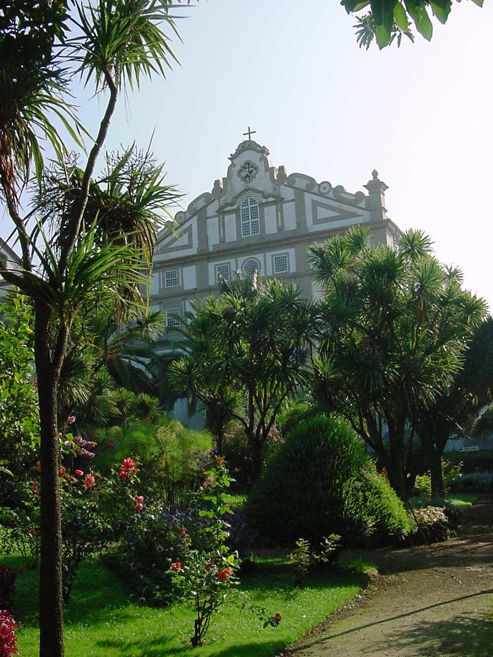 Jardim Duque da Terceira, ilha Terceira, Açores, Portugal.